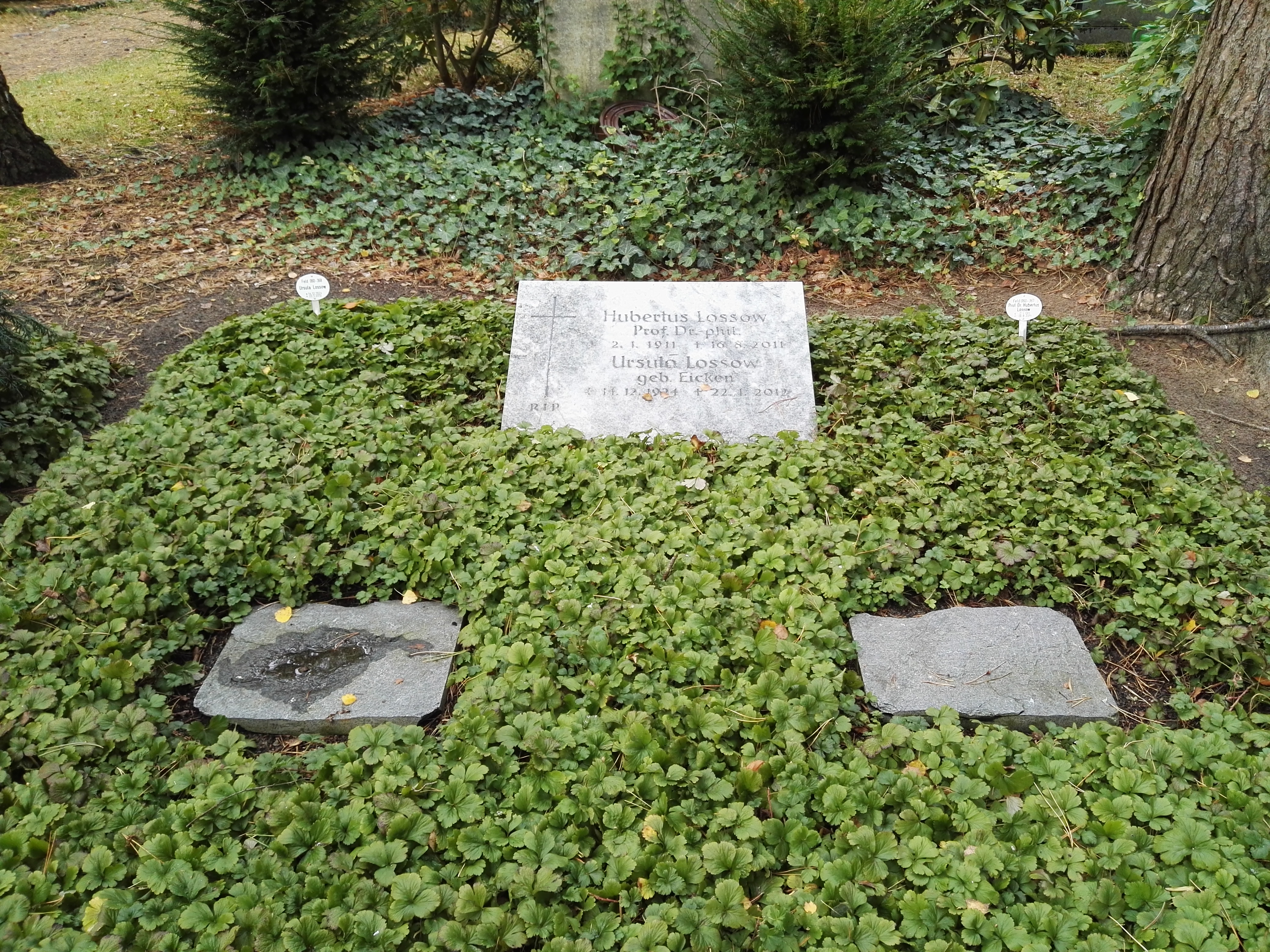 Grab von Prof. Hubertus Lossow auf dem Waldfriedhof Zehlendorf